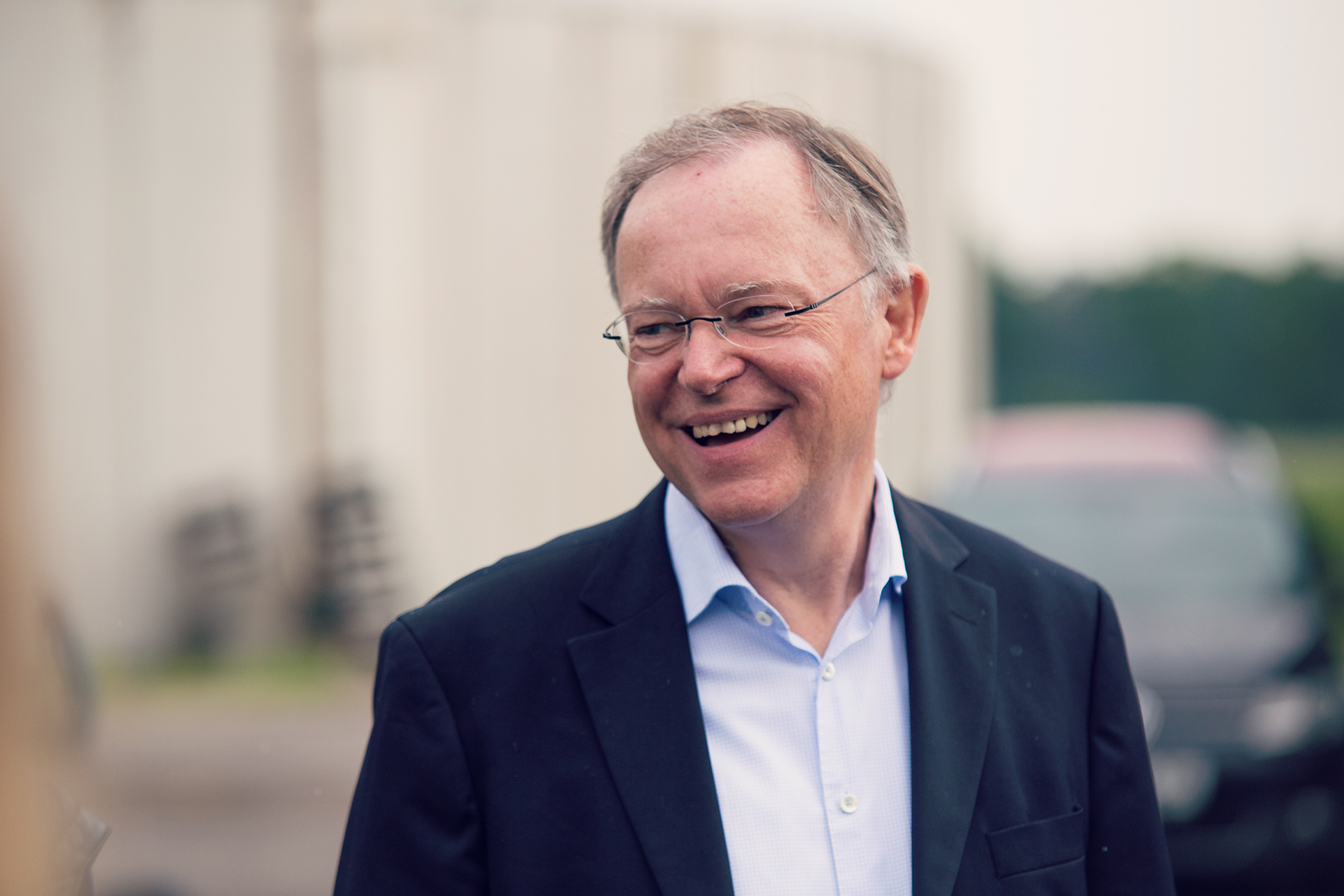 Stephan Weil, Ministerpräsident Niedersachsens